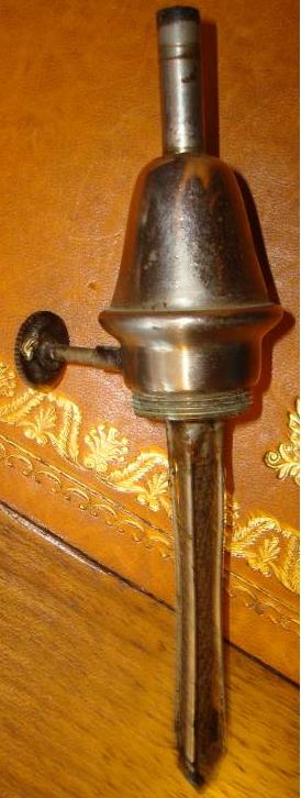 Lampe Pigeon, détail du bec de lampe.